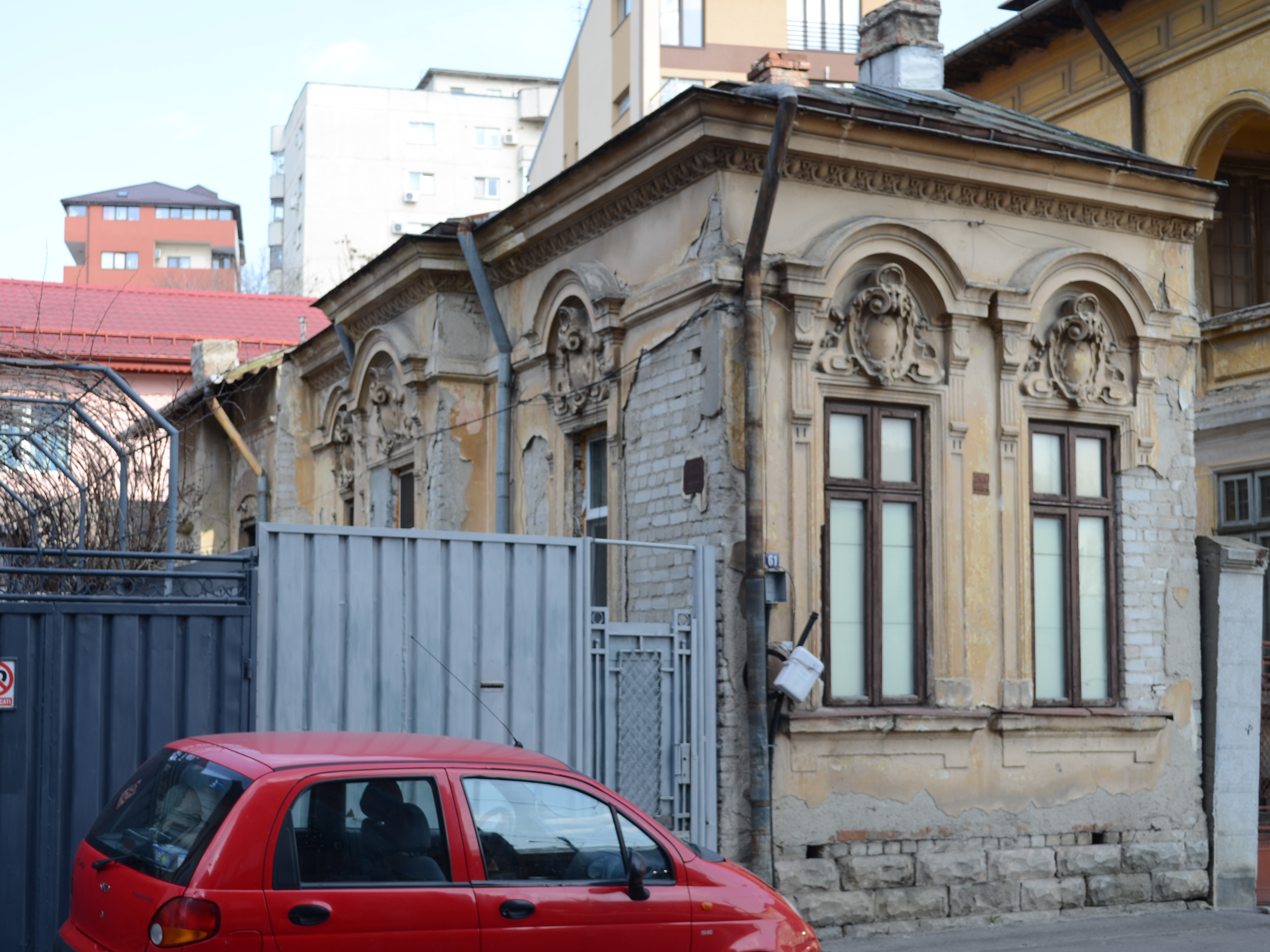 Casă, Str. Ion Minulescu nr. 61